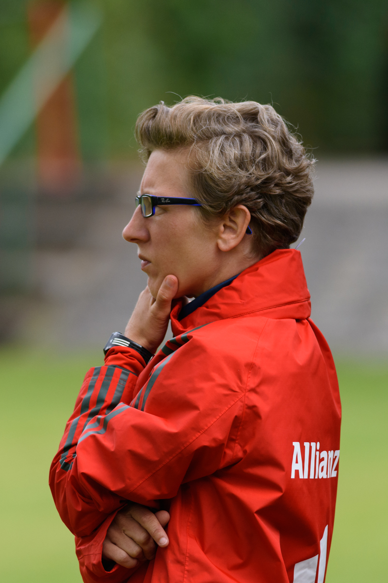 Nathalie Bischof at FFC Wacker München vs FC Bayern München II